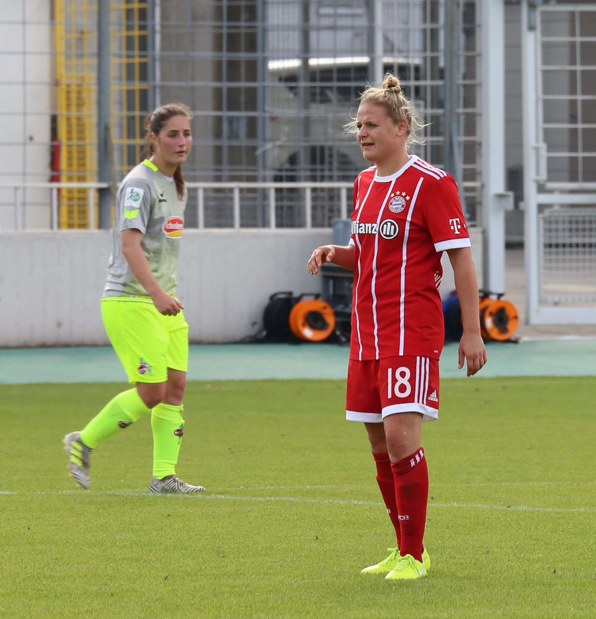 Dominika Škorvánková beim Frauen-Bundesliga-Spiel FC Bayern München gegen 1. FC Köln am 24. September 2017 im Stadion an der Grünwalder Straße (Ergebnis war 2:0)